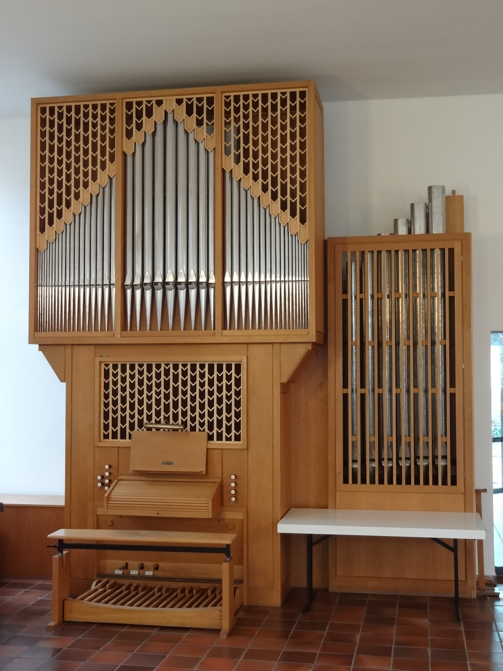 Evangelische Kapelle (Bad Salzhausen)